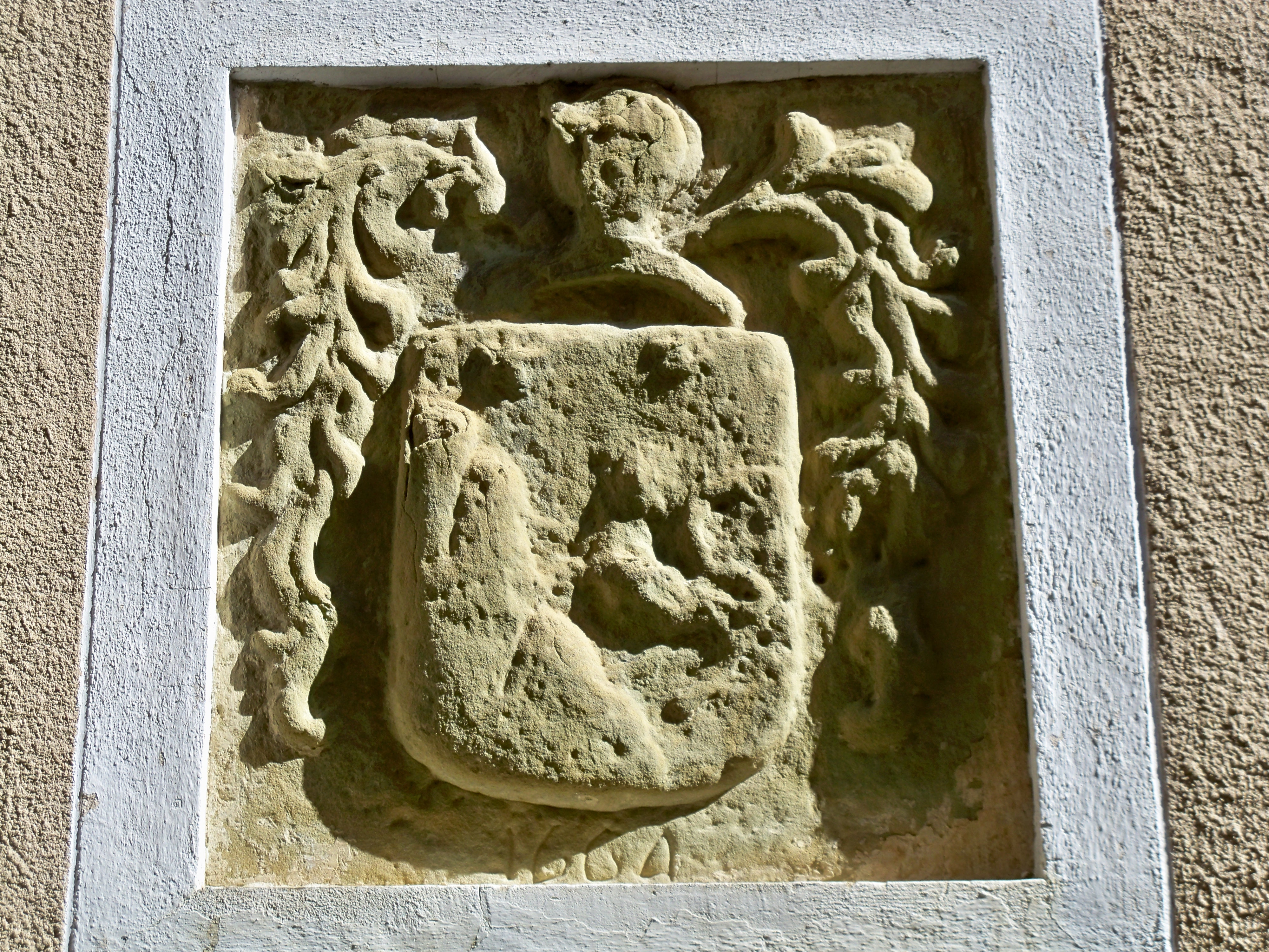 Blason de Saint André